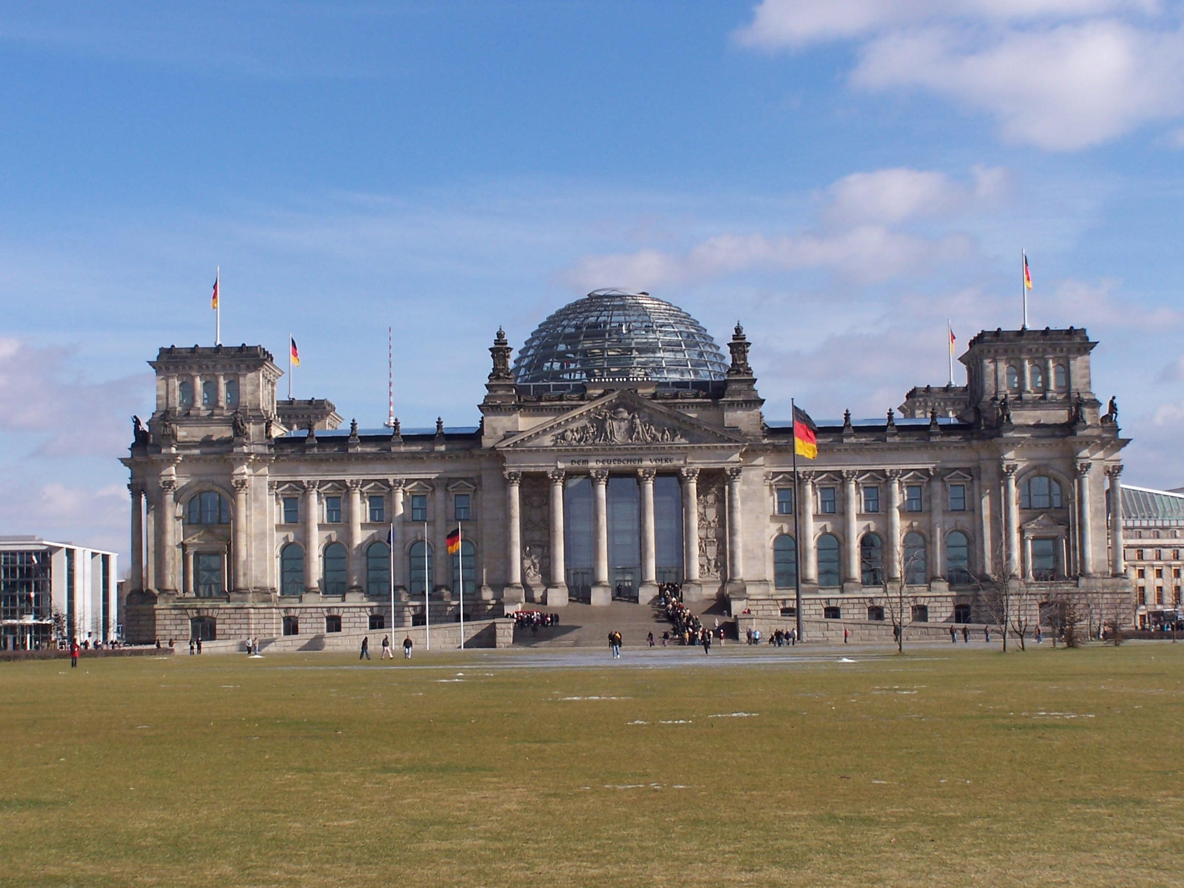 Reichstag in Berlin - Kuppel